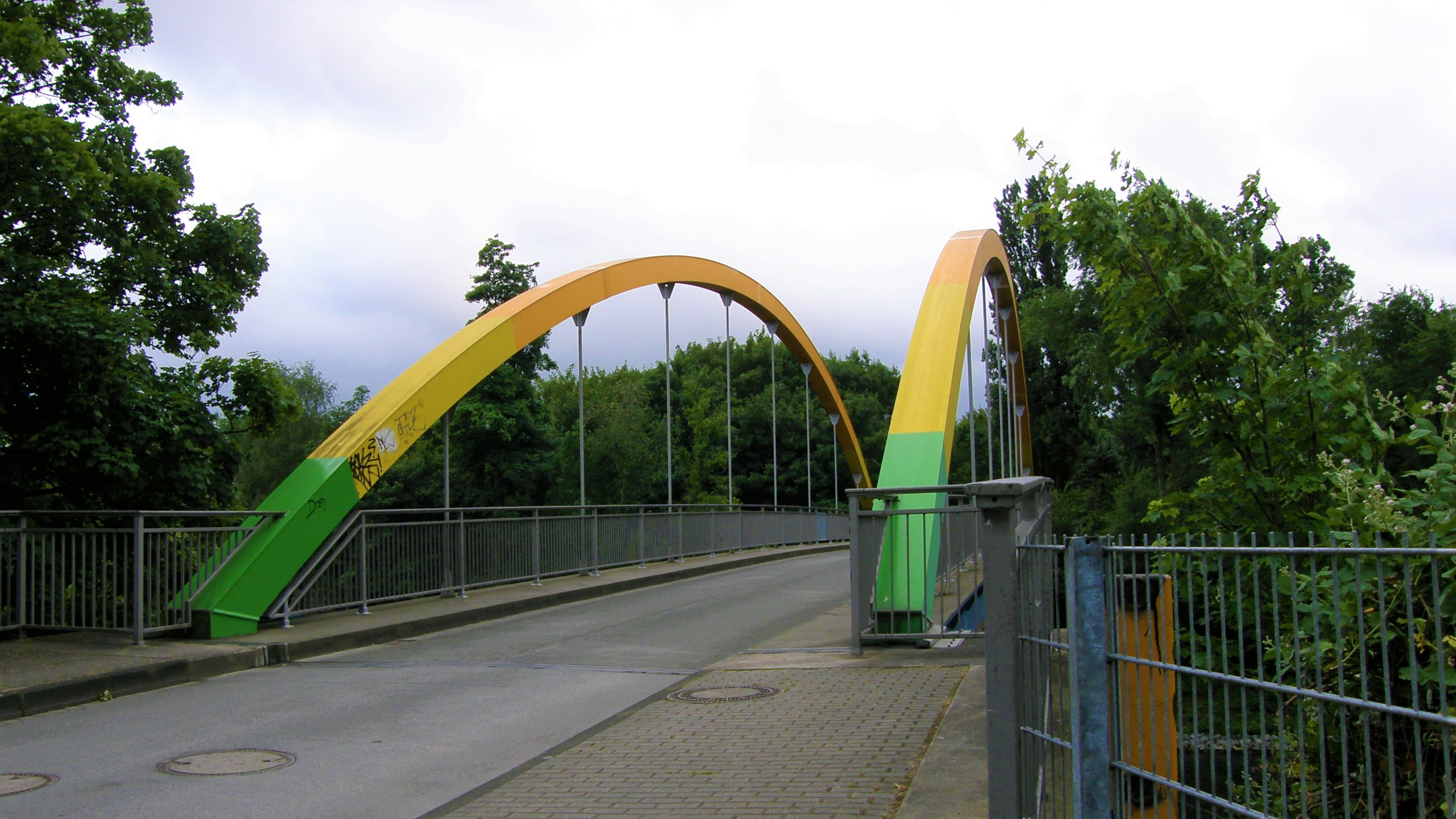 Ruhraue Brücke Schwiesenkamp über den Ruhrkanal